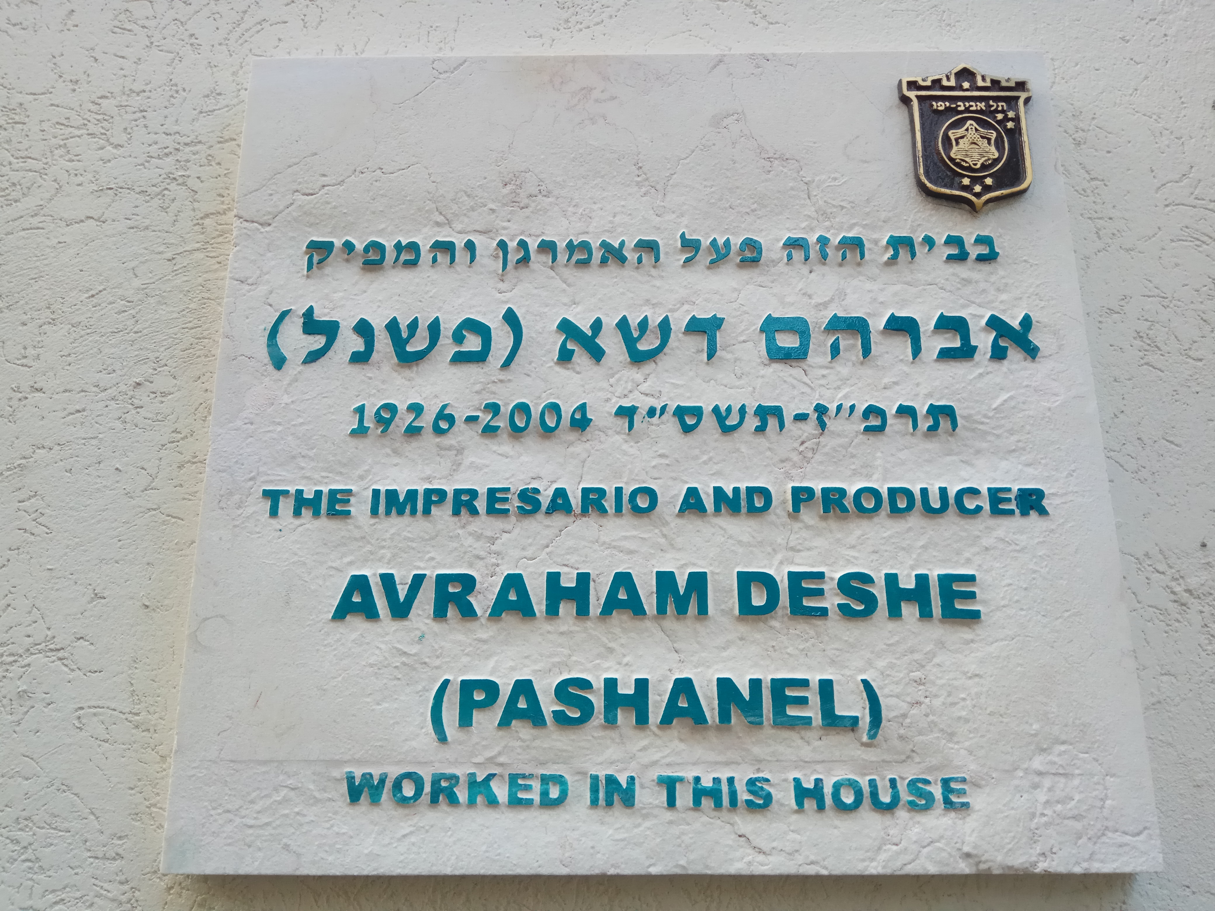 לוחית זיכרון לאמרגן והמפיק אברהם דשא (פשנל) ברחוב דיזנגוף 108 בתל אביב